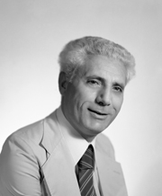 politico italiano